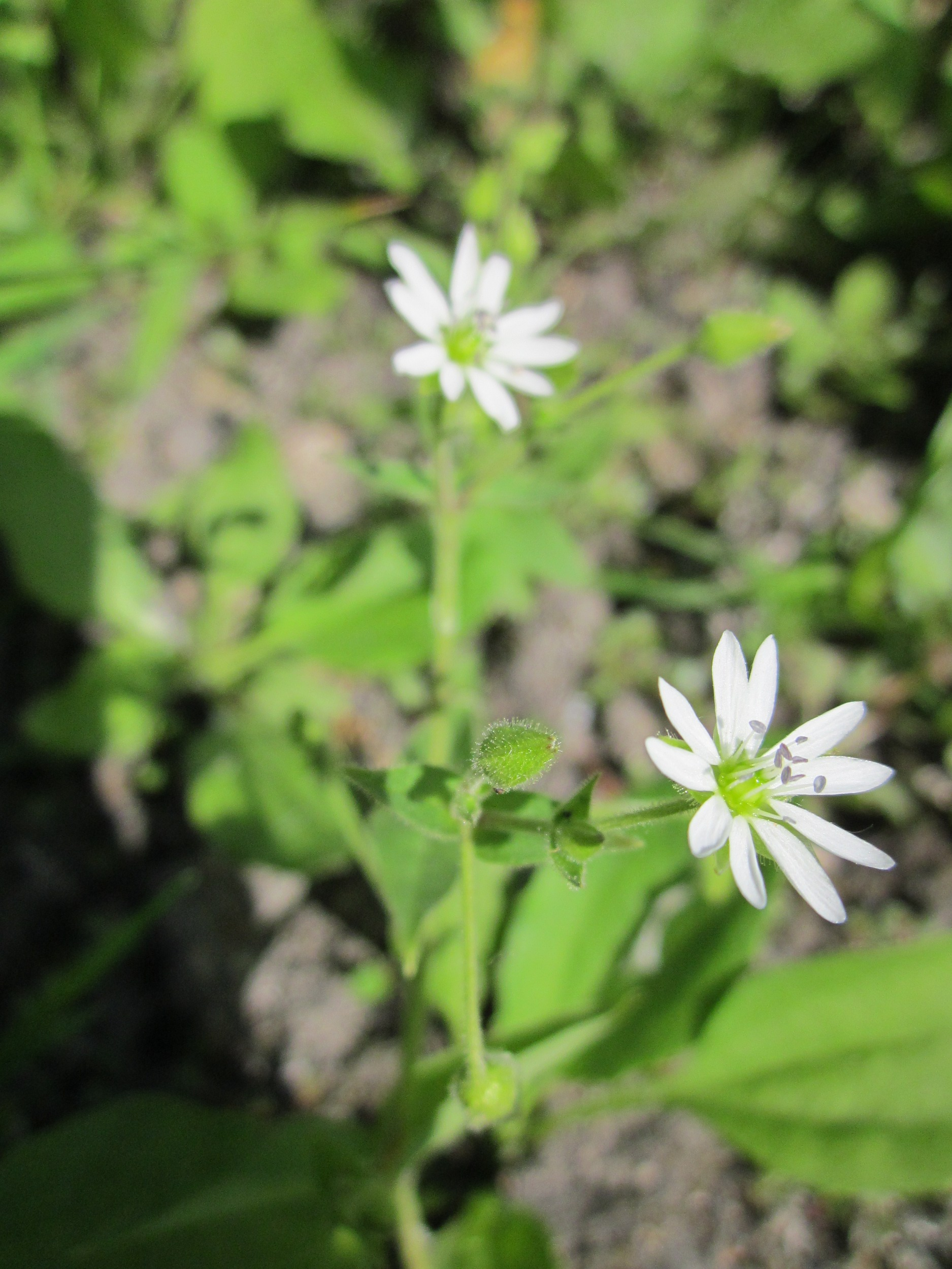 Große Wasserdarm (Myosoton aquaticum) in den Wagbachauen bei Oberhausen-Rheinhausen